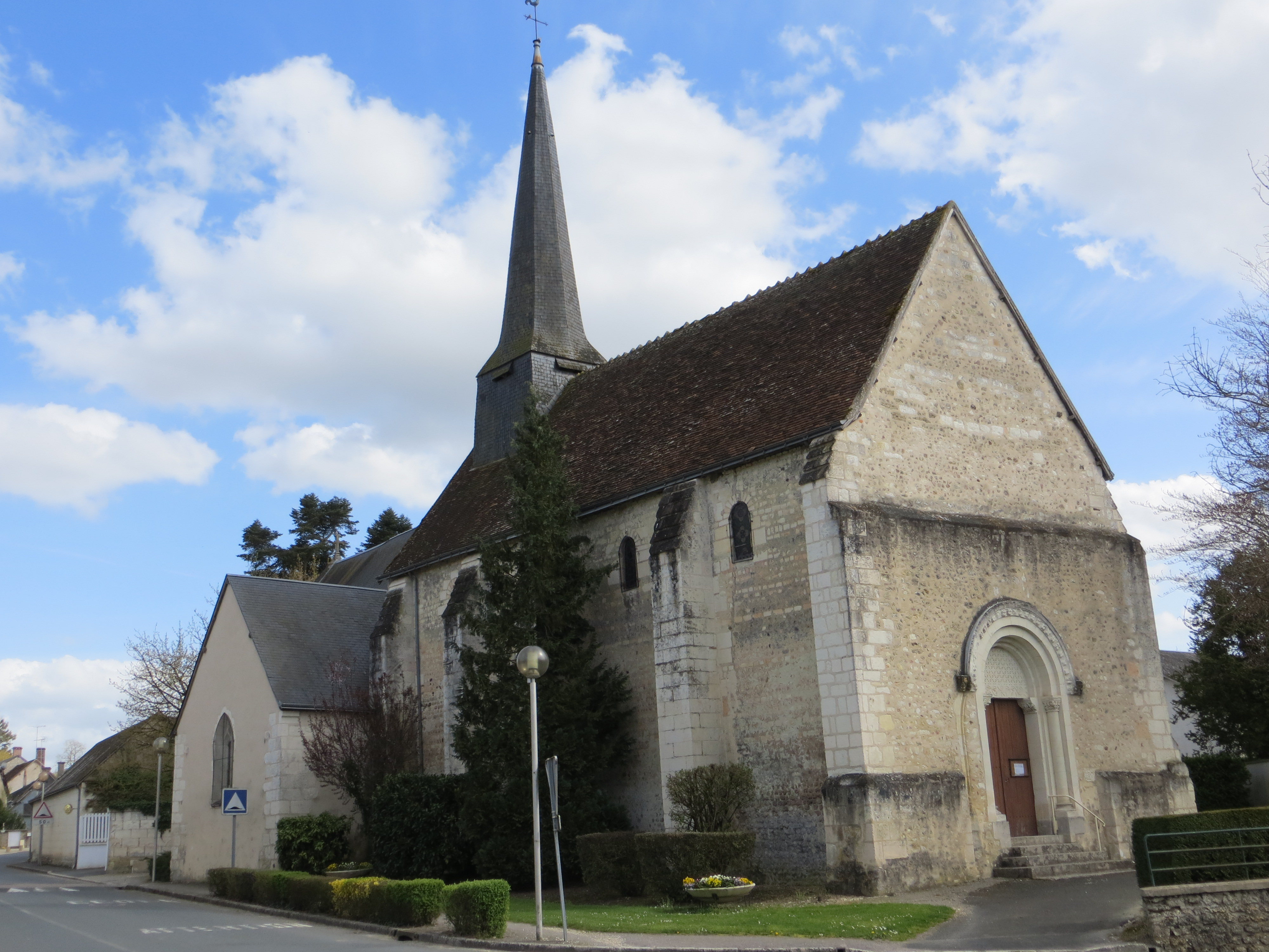 Eglise du village